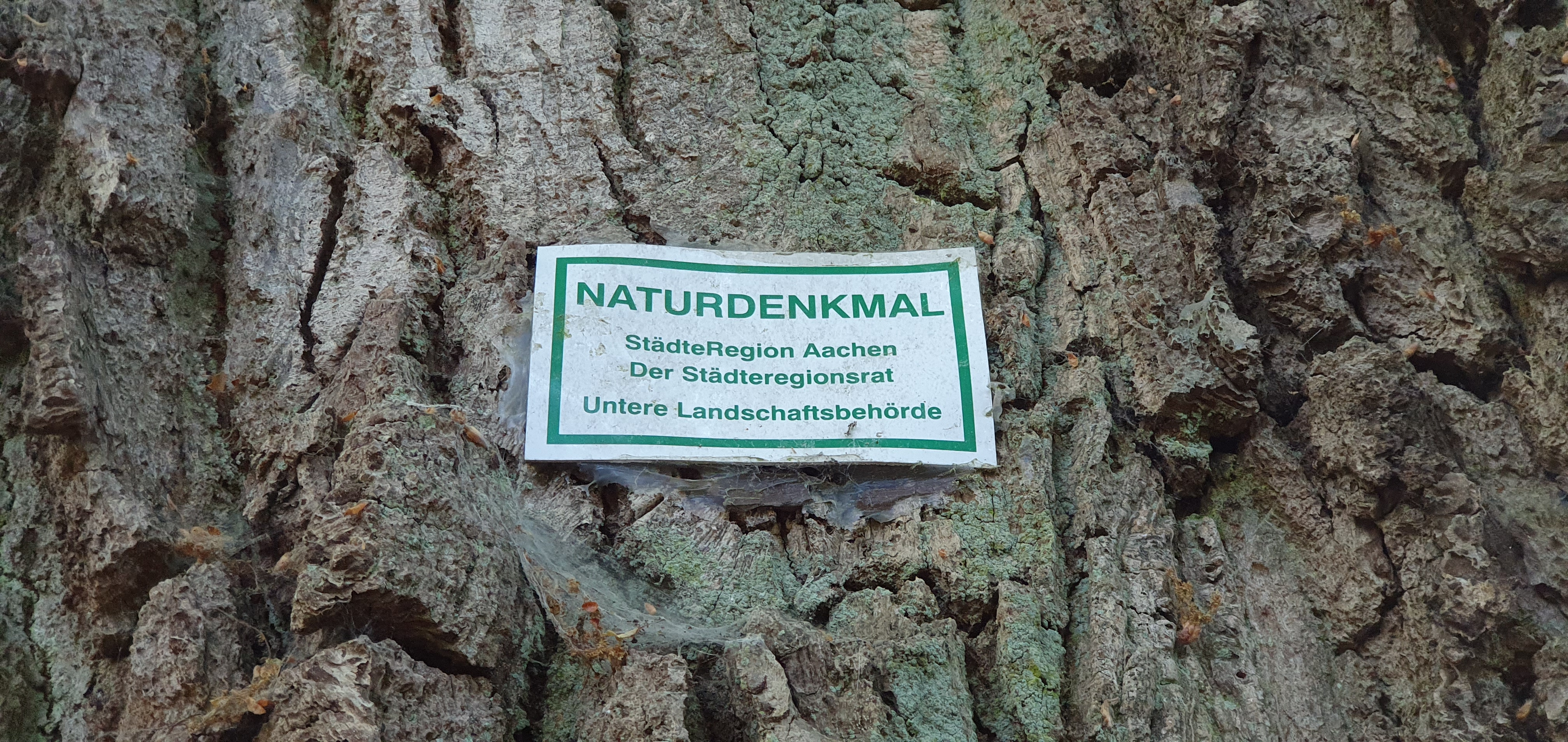 Naturdenkmäler Städteregion Aachen Alsdorf Stieleiche (Quercus robur) 01